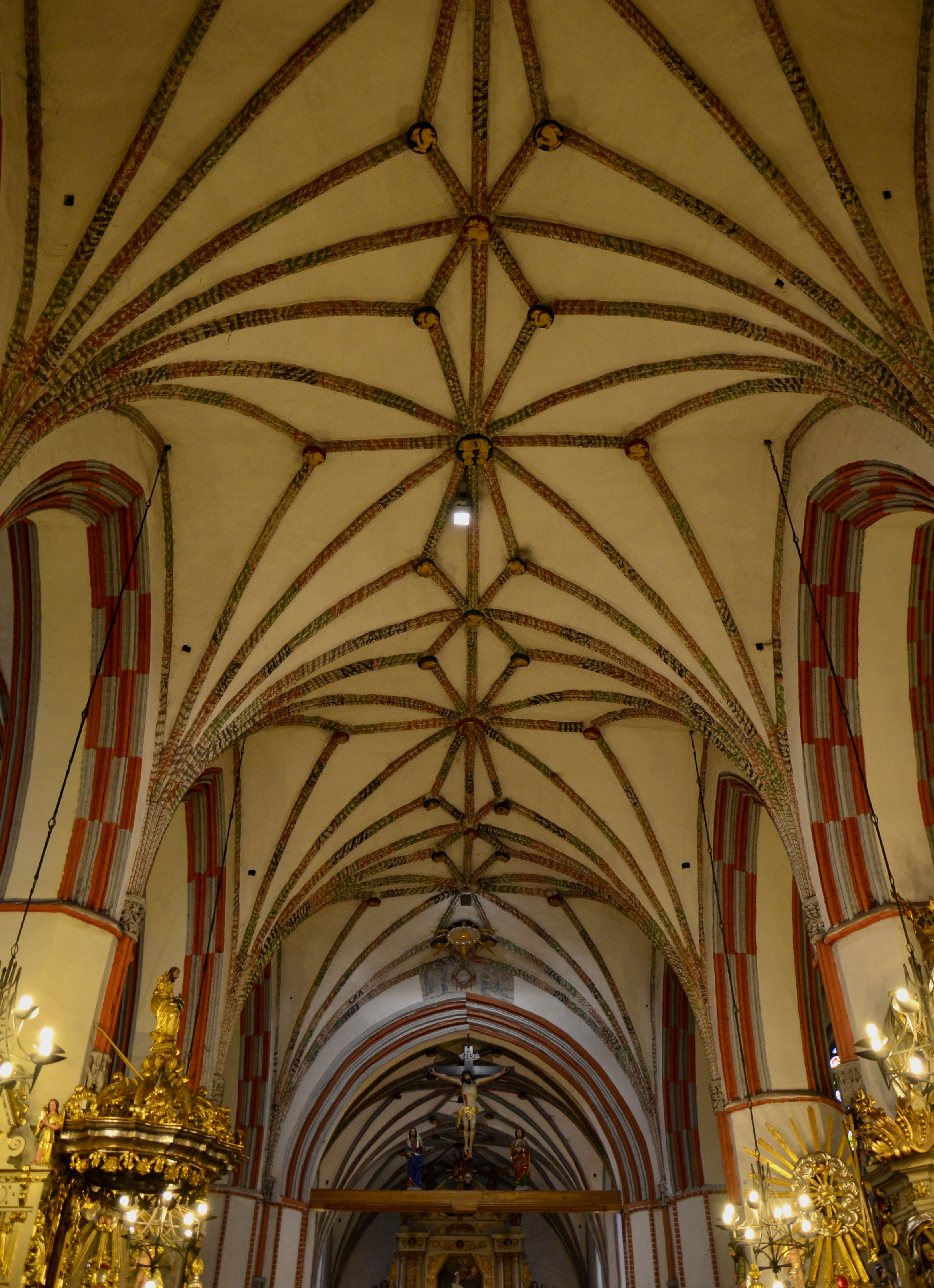 Brodnica, ul. Farna - rzymskokatolicki kościół parafialny pw. św. Katarzyny, 1285-XIV (sklepieni nawy głównej)